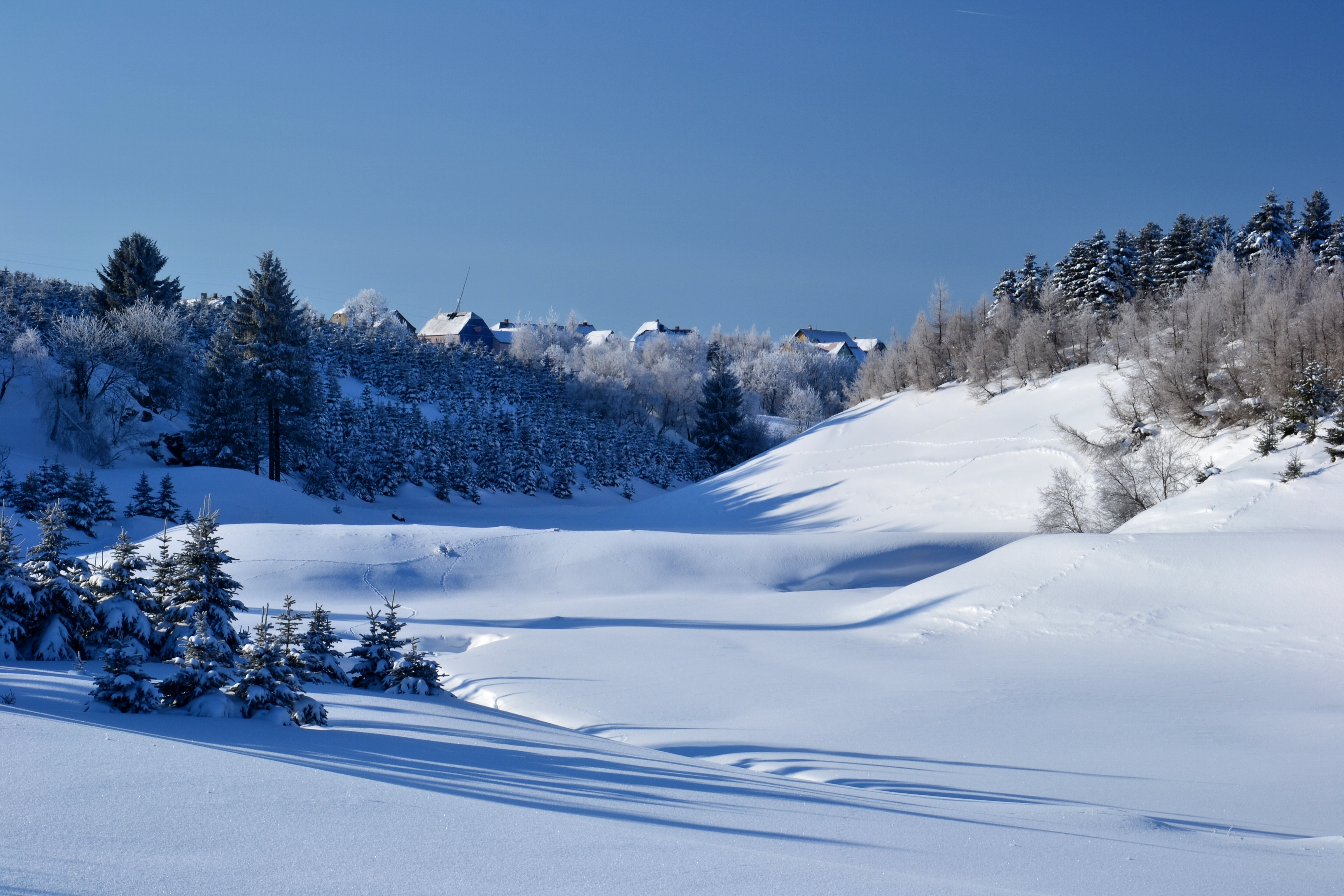 Přírodní park Bezručovo údolí - Bezručovo údolí pod Horou Svatého Šebestiána